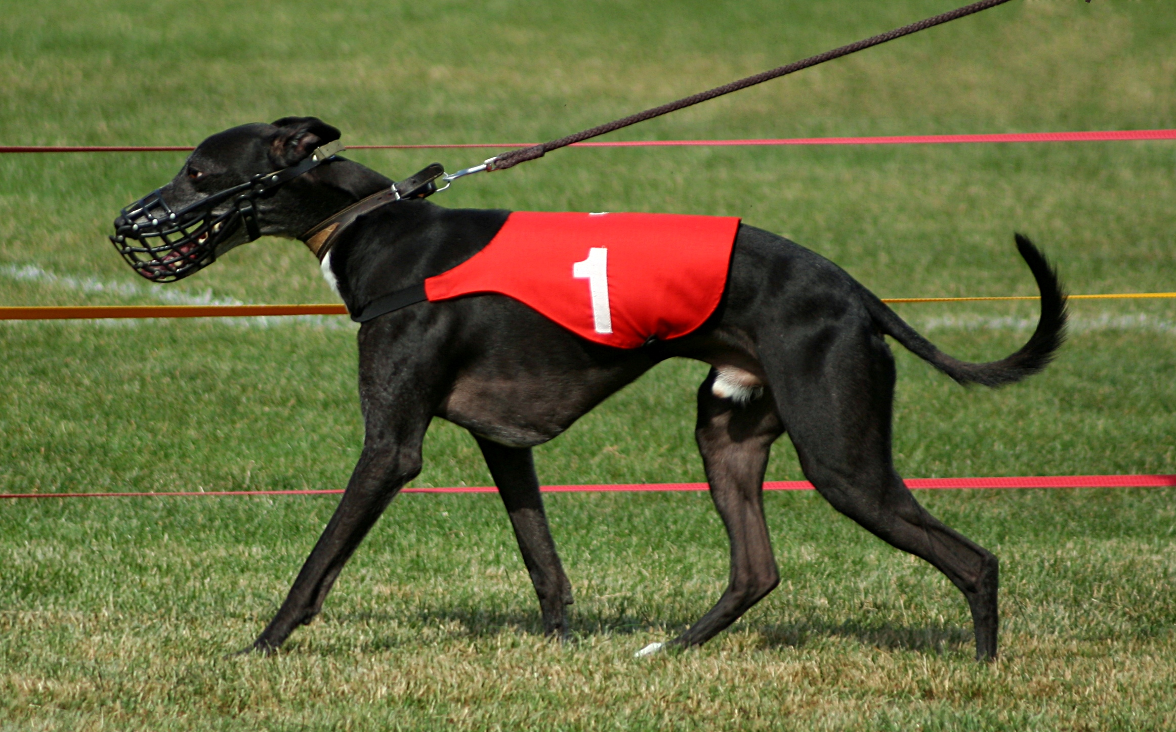 Charty angielski Whippet podczas torowych wyścigów chartów w Bytomiu-Szombierkach.